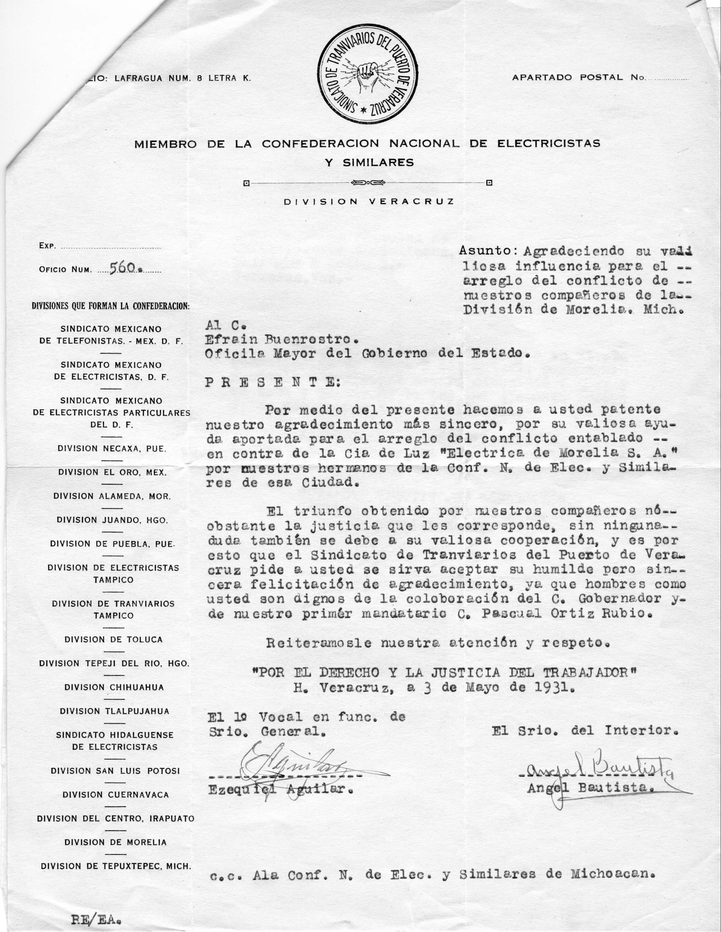 Agradecimiento a Efrain Buenrostro por su apoyo al sindicato de tranviarios